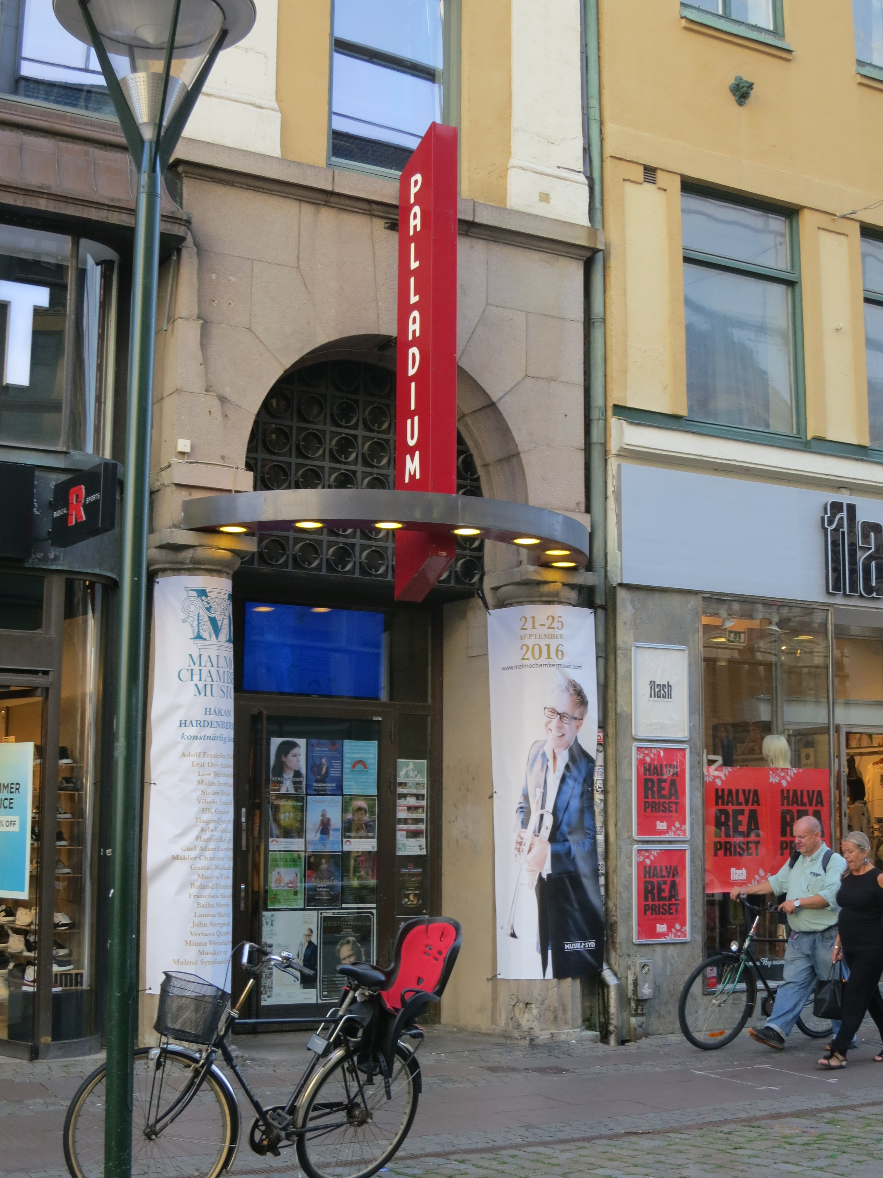 Palladium, Malmö